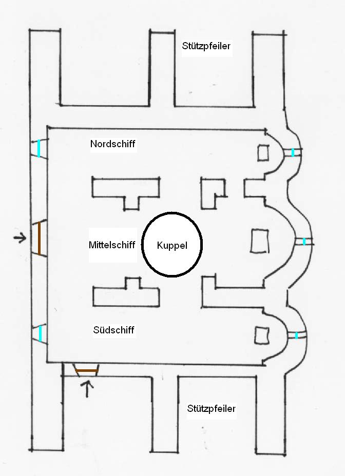 Panhagia Kera bei Kritsa, Kreta, Griechenland. Grundriss der Kirche